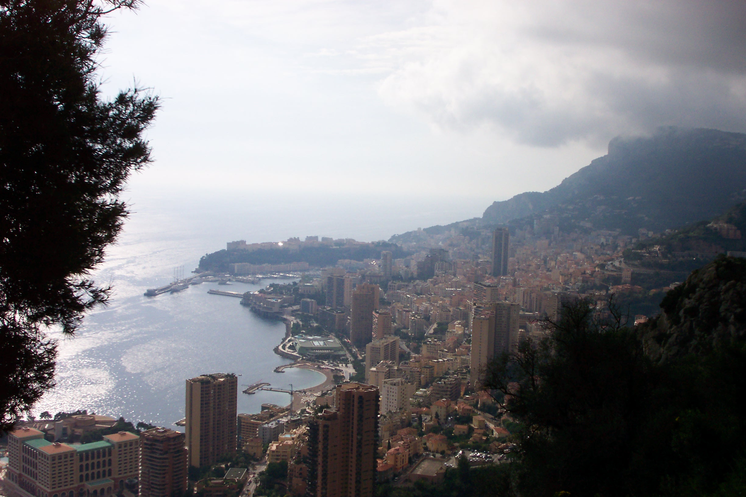 Ministát Monako v zamračeném počasí